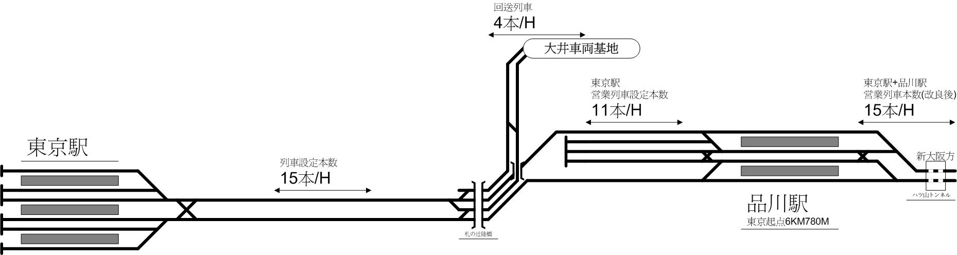 JR東海品川站軌道配置圖及建設要點